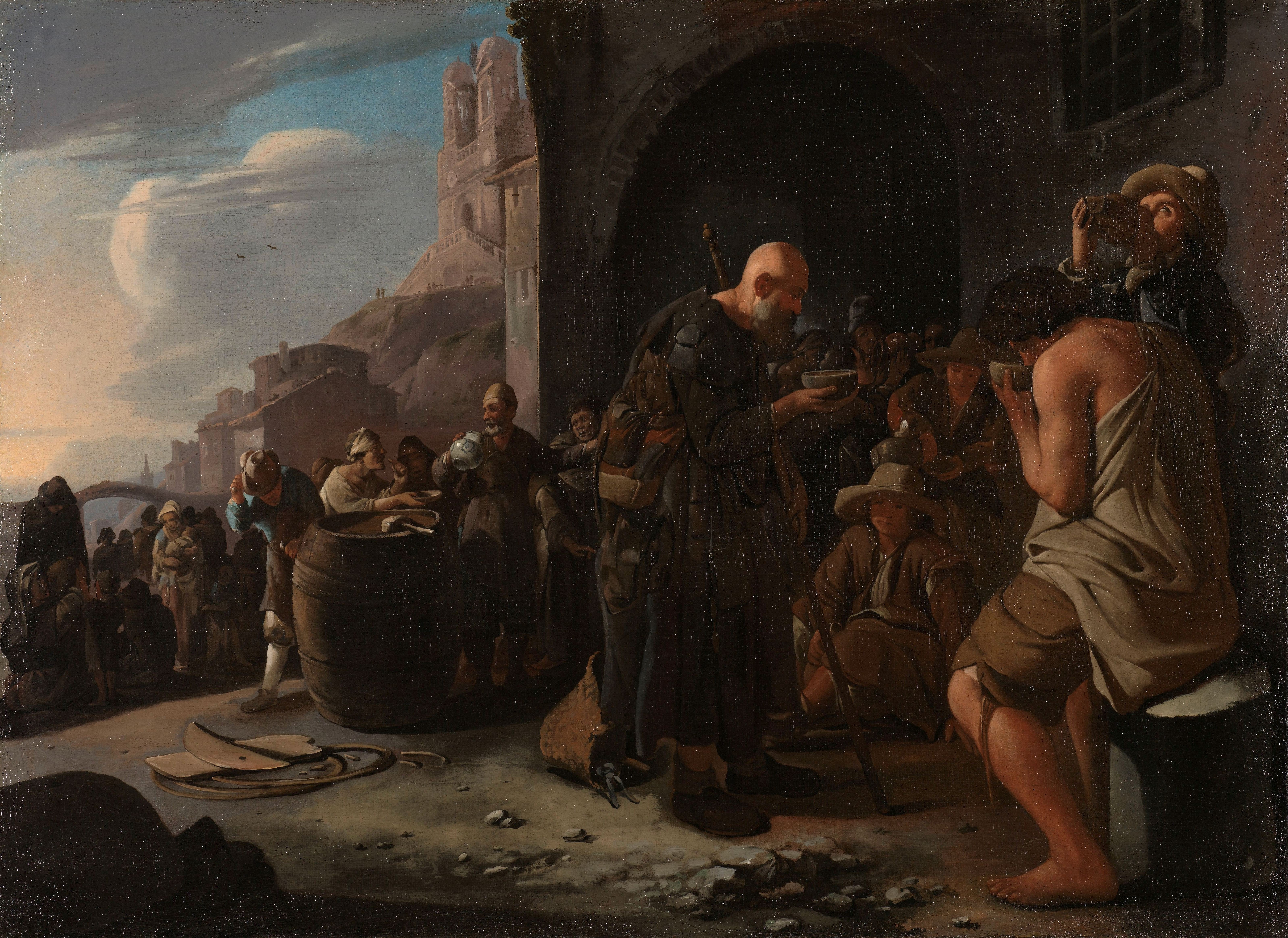 De dorstigen laven. In een Italiaanse omgeving krijgt een groep dorstige mensen te drinken. In het midden een staande kale bedelaar met een stok. Op de achtergrond een kerk op een heuvel, wellicht de SS. Trinità dei Monti. Onderdeel van een reeks van voorstellingen van de zeven werken van barmhartigheid (zie: SK-A-2845/48).; Michael Sweerts (1618–1664), olieverf op doek, ca. 1646–1649